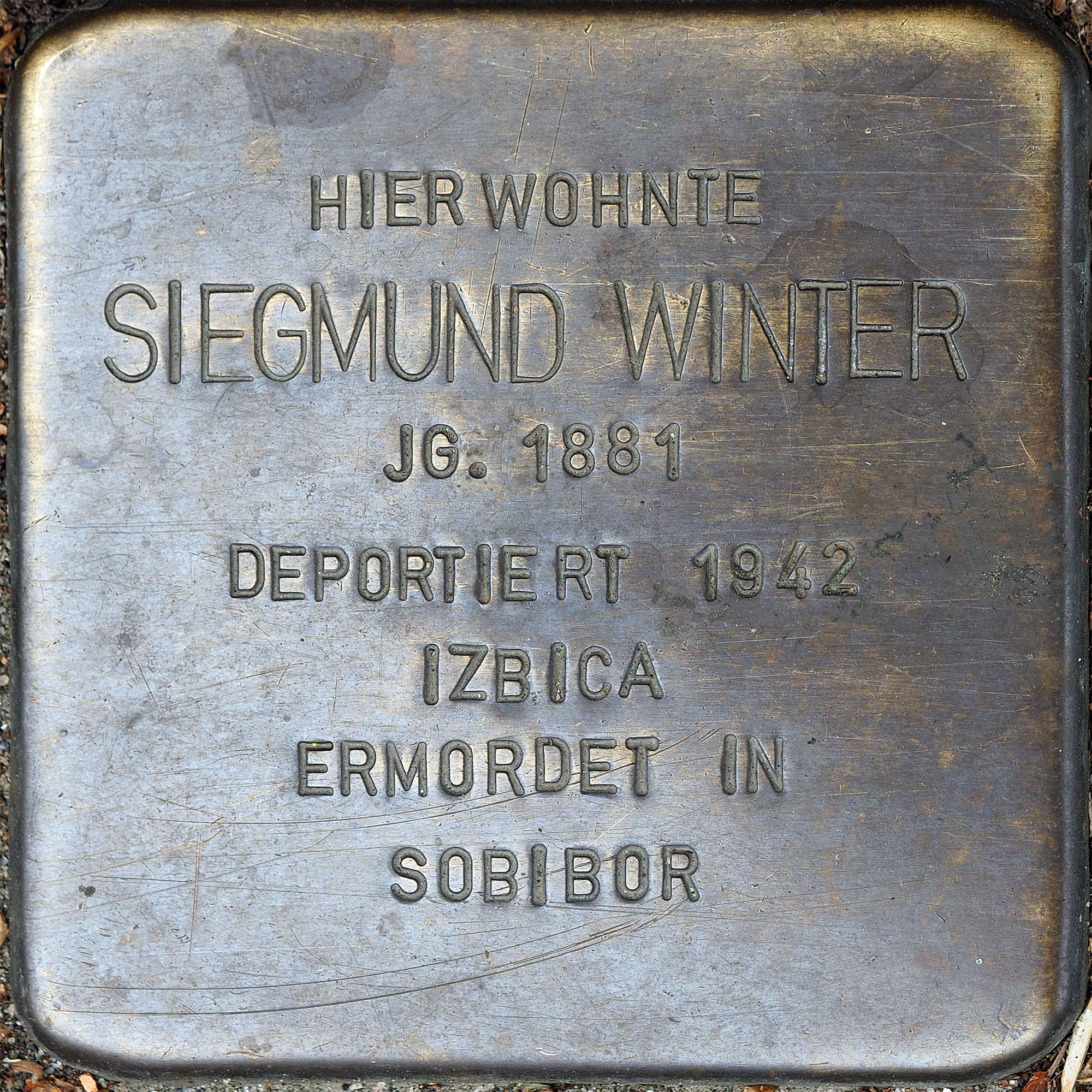 Stolpersteine MG: Winter, Siegmund